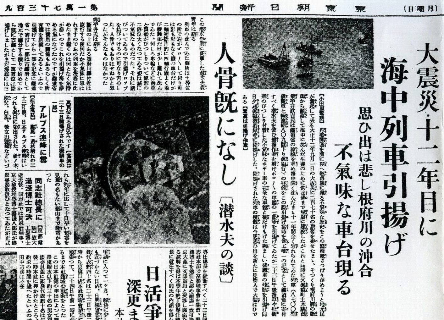 関東大震災で根府川駅もろとも海中に沈んだ列車の引き揚げを報じる東京朝日新聞。